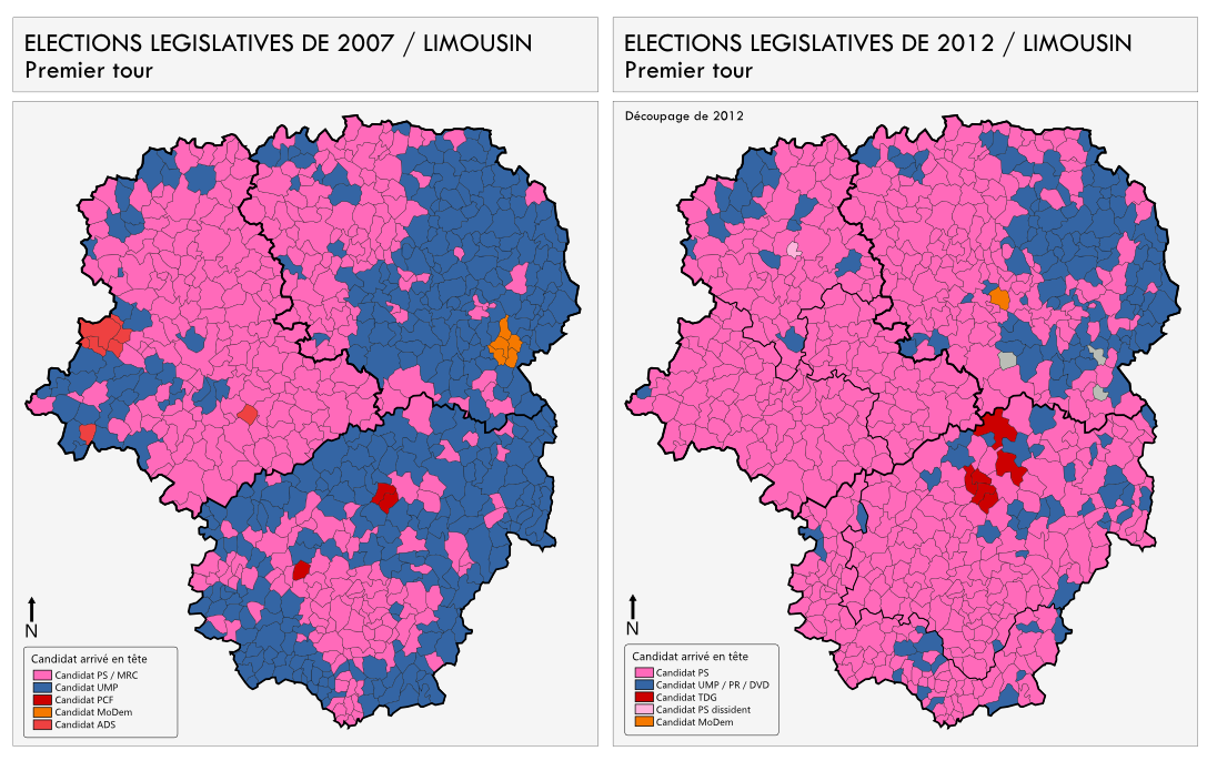 Comparaison des résultats du 1er tour des élections législatives 2007 et 2012 en Limousin (candidat en tête par commune).